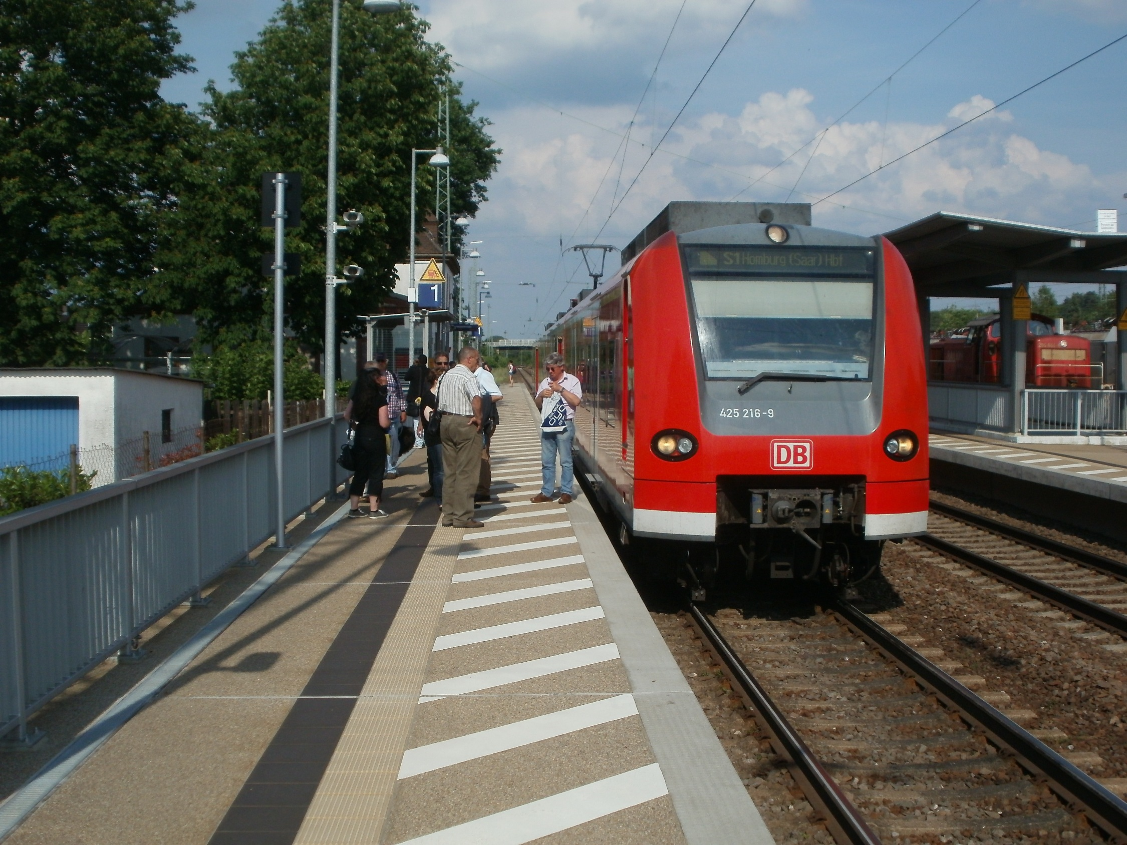 Bahnhof Kaiserslautern-Einsiedlerhof - Der Zug blieb wegen eines Stellwerkfehlers an diesem Tag liegen